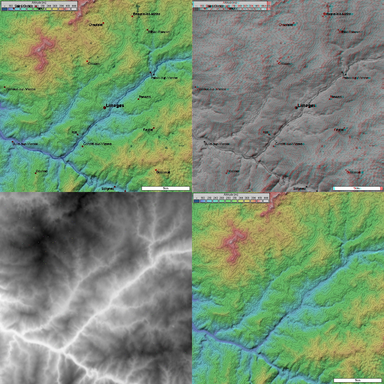 Topographie de Limoges 4 images topographique (20 km de coté) de Limoges prisent par la mission SRTM. Image topographique + position des villes image topographique en relief + position des villes image topographique en niveau de gris (utile pour displacement map dans les logiciel 3D) Image topographique sans les villes Générée par le logiciel Radiomobile à partir des données domaine publique de la mission SRTM de la NASA.